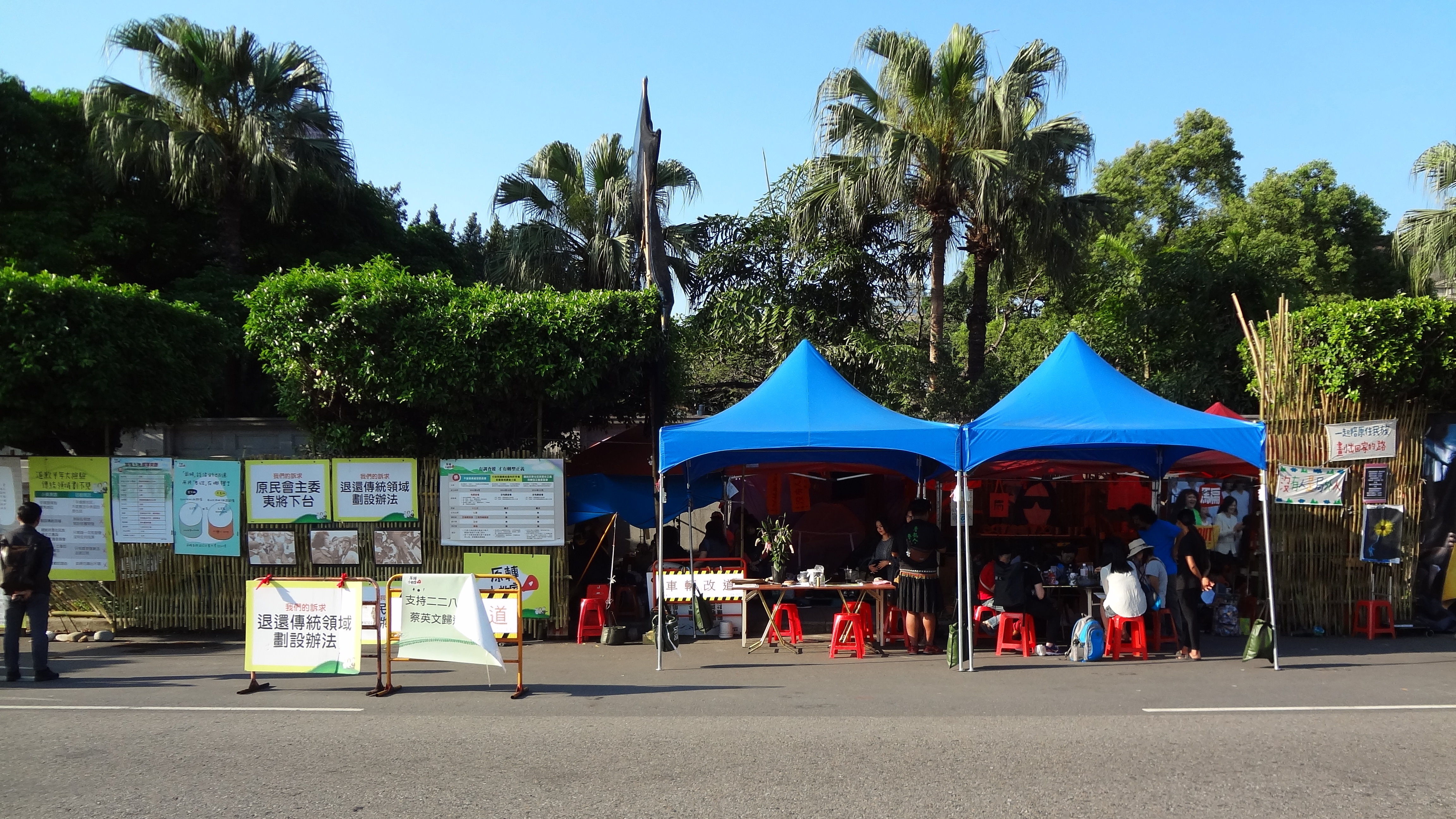 臺北市中正區凱達格蘭大道臺北賓館圍牆外，原住民族轉型正義小教室紮營抗爭，反對《原住民族土地或部落範圍土地劃設辦法》排除私有土地劃入臺灣原住民族傳統領域。